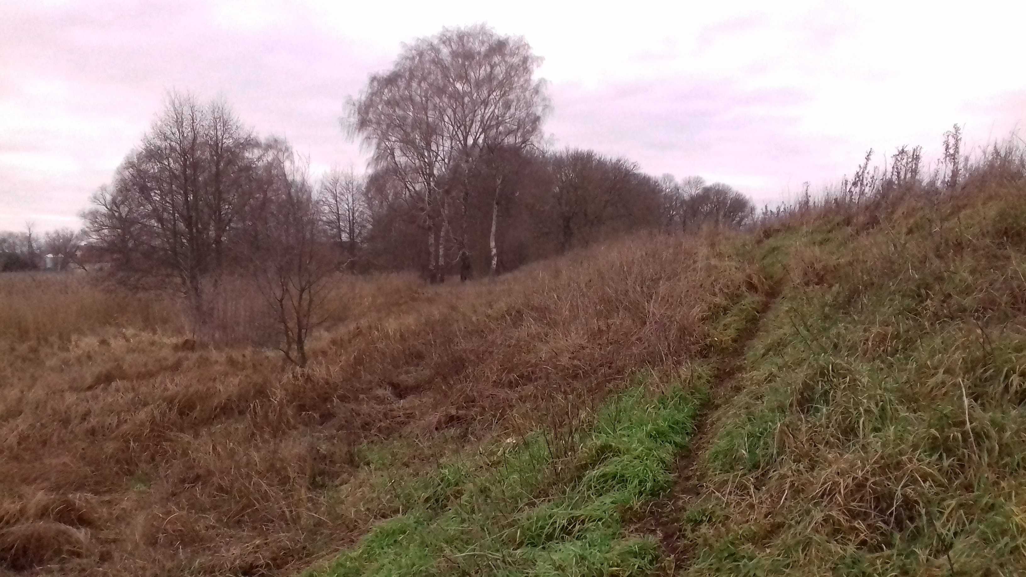 Szlak pieszy nr 3583 nad brzegiem Jeziora Witobelskiego